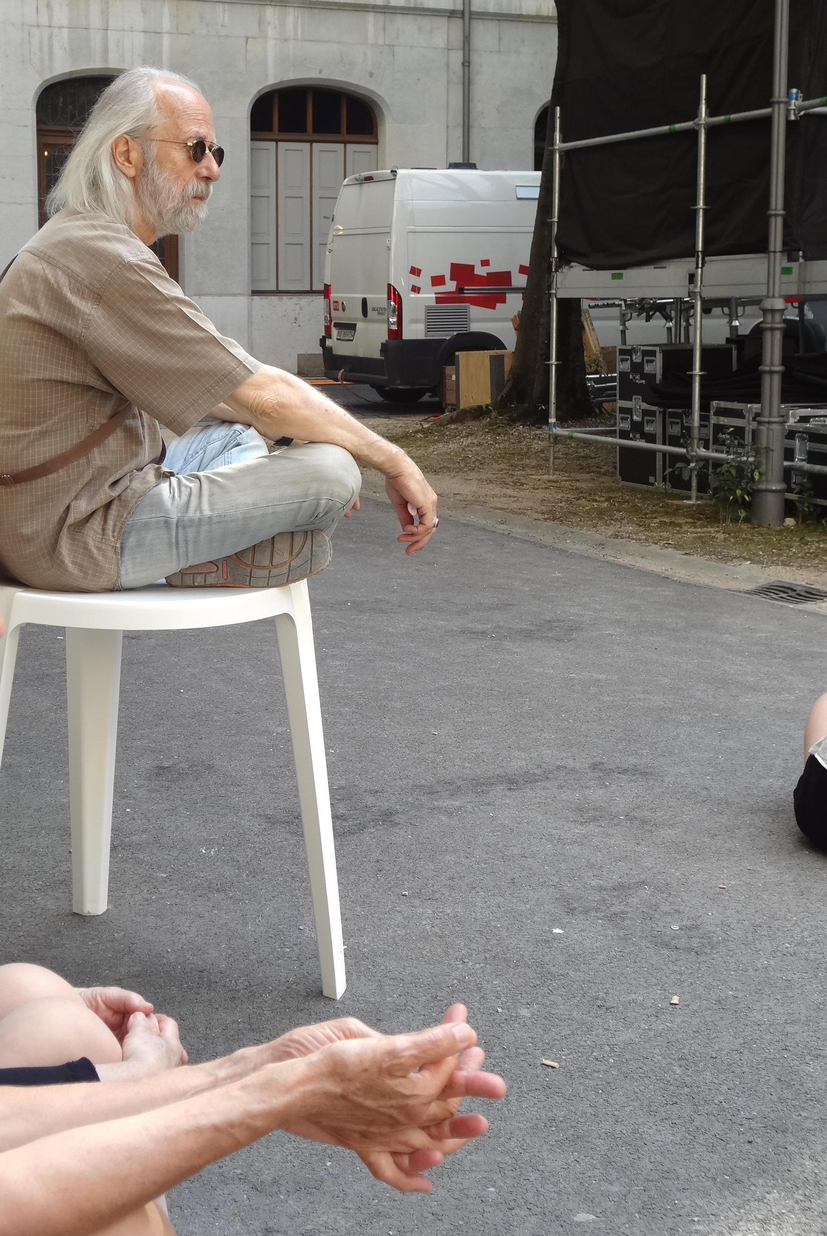 Fête de la musique le 25 juin 2017 à Genève : spectacle du groupe « France Varpet », musiques traditionnelles d’Arménie, sur la scène des Ateliers d'ethnomusicologie animée par Laurent Aubert, dans la Cour des Casemates.